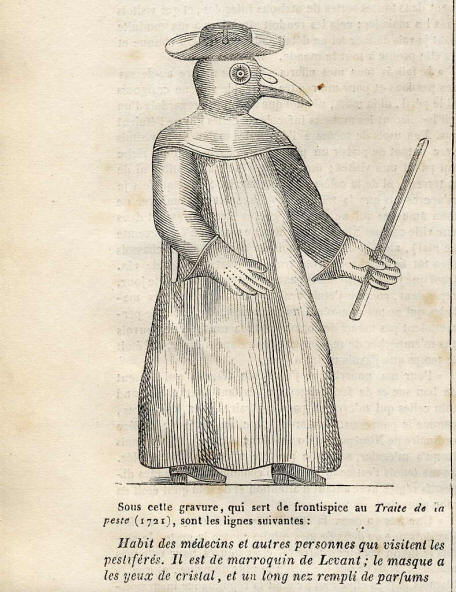 " Sous cette gravure , qui sert de frontispice au Traite de la peste (1721) , sont les lignes suivantes : Habit des médecins et autres personnes qui visitent les pestiférés . Il est de marroquin de Levant ; le masque a les yeux de cristal , et un long nez rempli de parfums ".